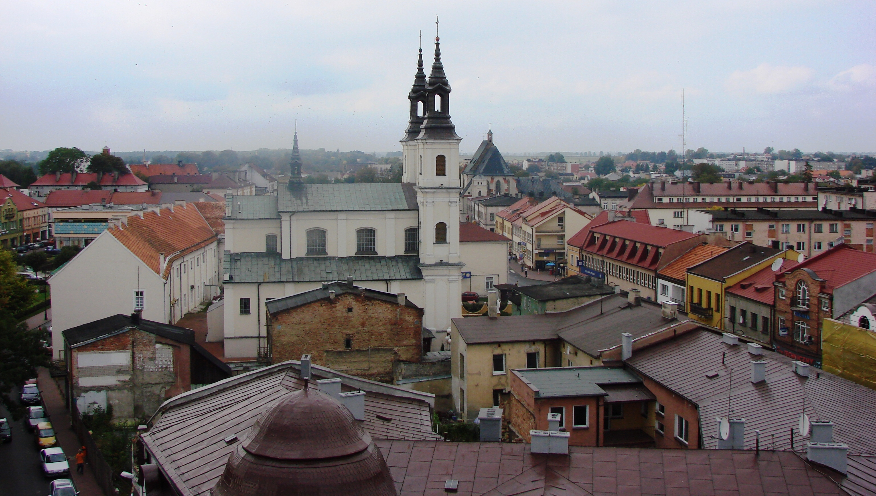 Pohled na město Wieluń, Polsko